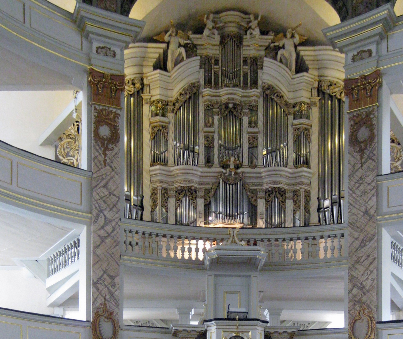 Waltershausen Stadtkirche Zur Gotteshilfe